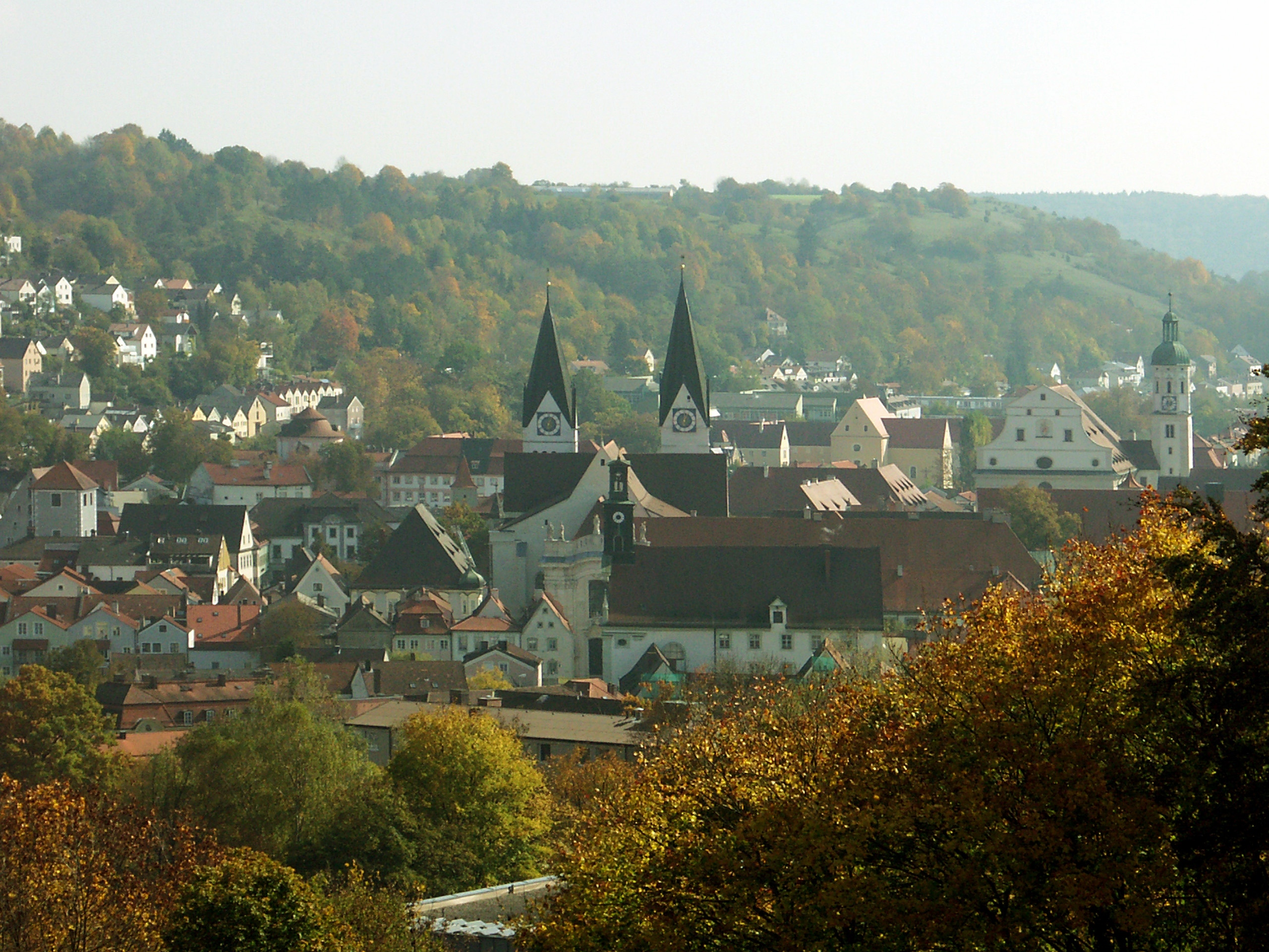 Eichstätt